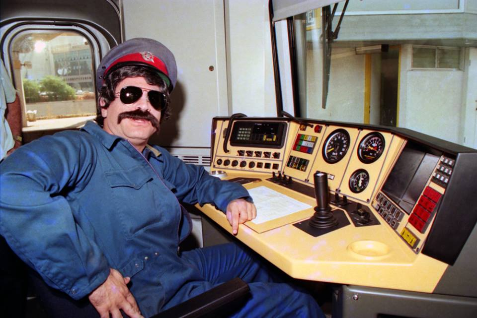 אלי יצפאן רכבת עולה חדש מרוסיה